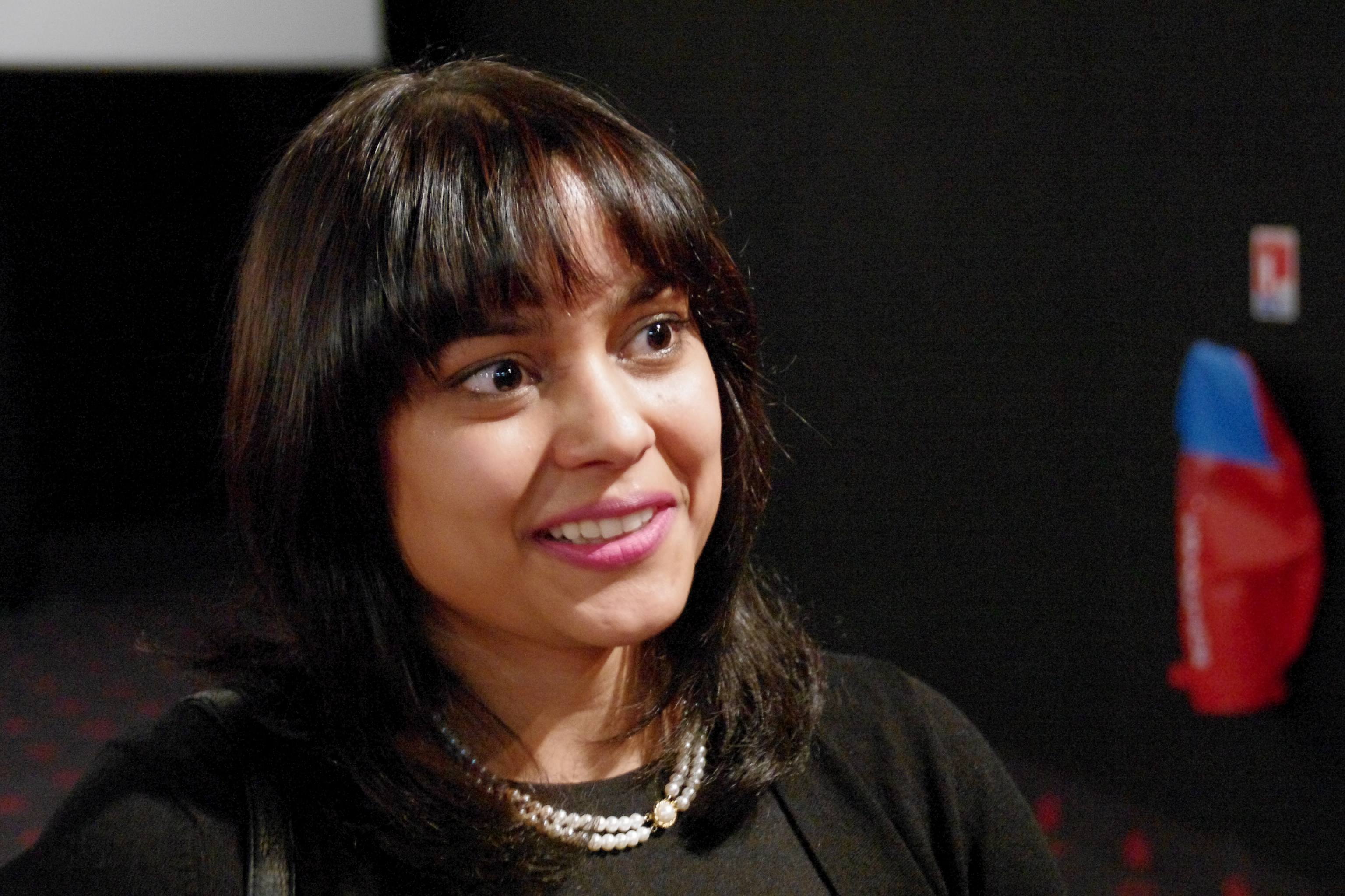 Festival des Cinémas d'Asie - Vesoul 2016